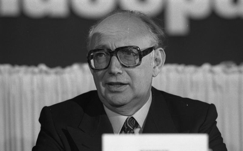 27. Bundesparteitag der FDP in Frankfurt/Main (Wolfgang Mischnick)